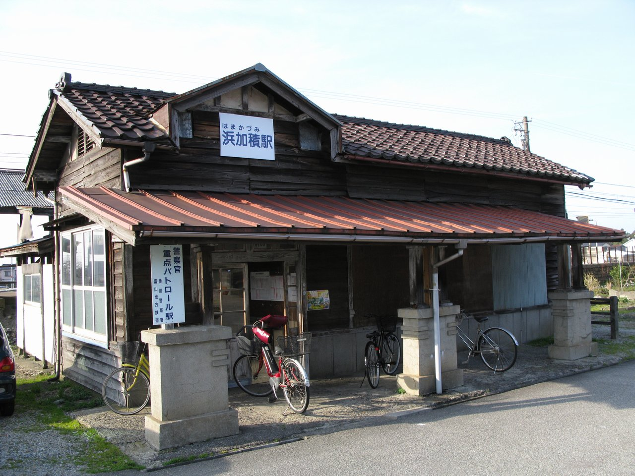 富山県滑川市にある富山地方鉄道浜加積駅